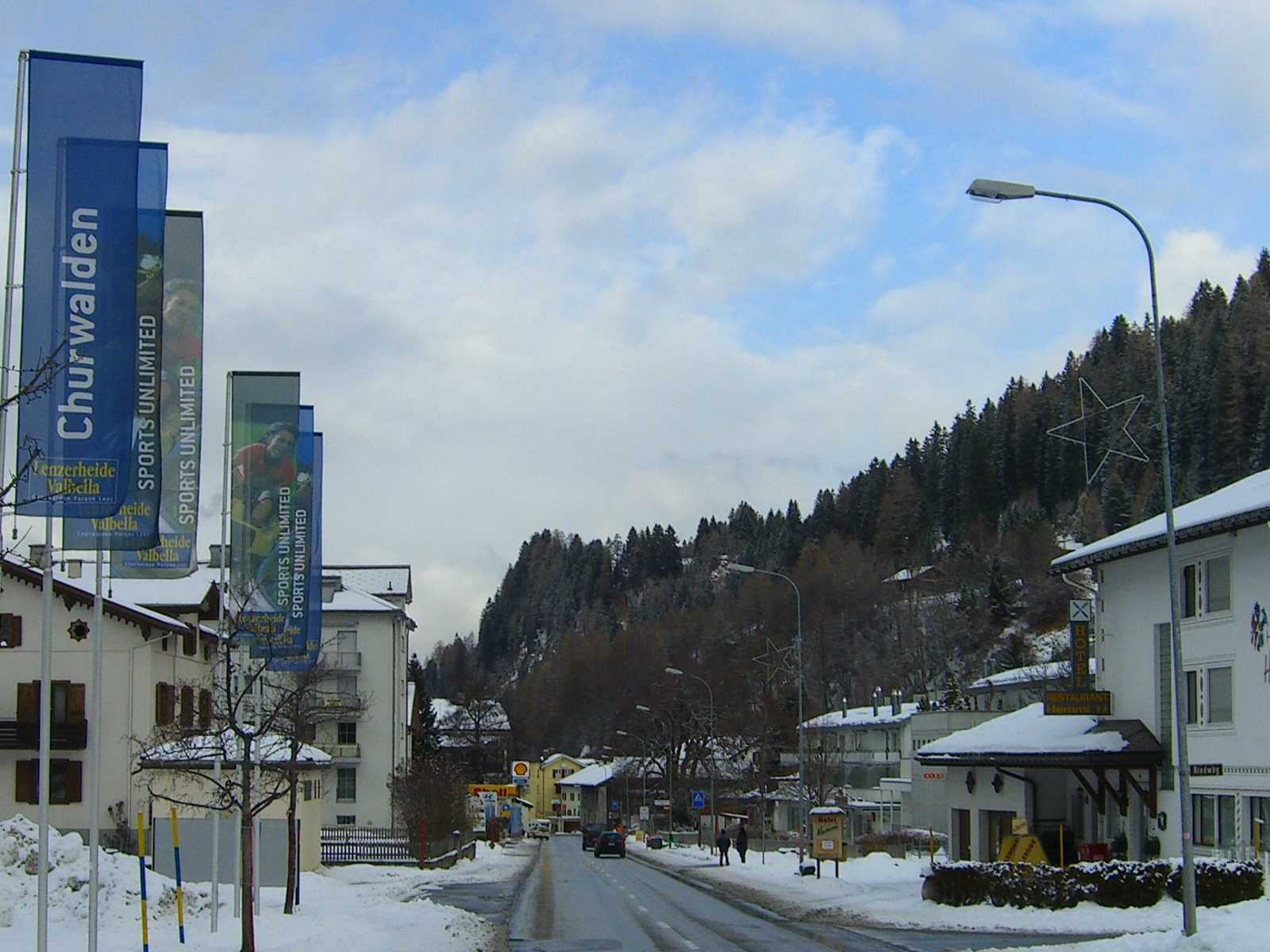 Churwalden in Graubünden/Schweiz. Dorfstrasse. Quelle: Bravuogn, Autor: Bravuogn